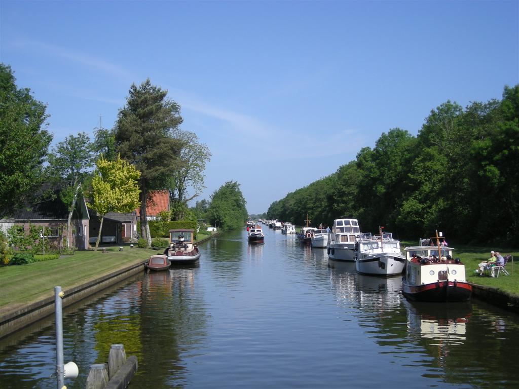 Engelenvaart vanaf de brug in Nieuweschoot richting Heerenveen